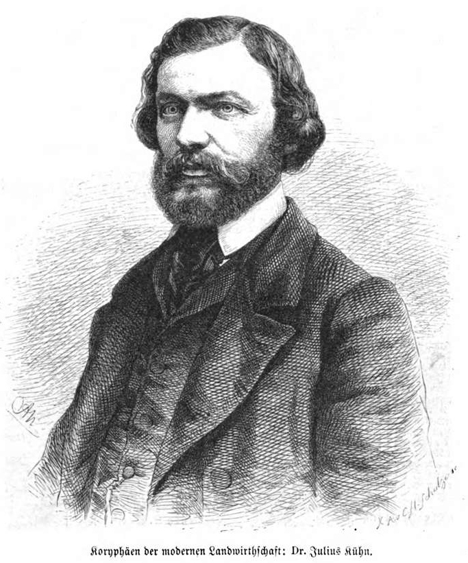 Julius Kühn, deutscher Agrarwissenschaftler im 19. Jh.